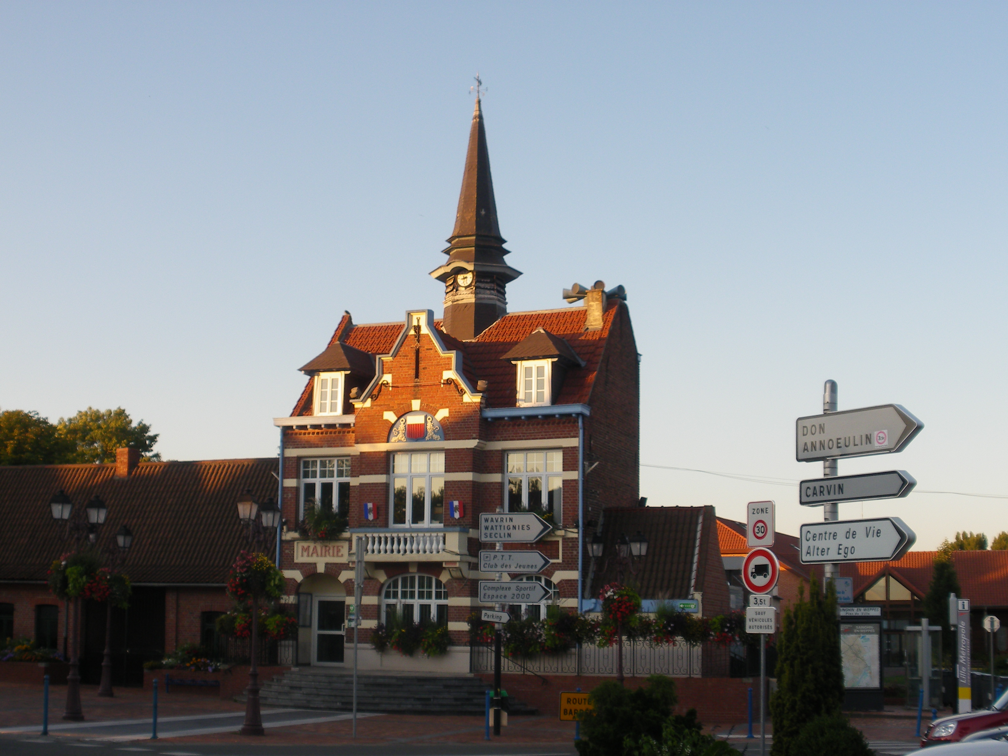 Vue de la mairie de Sainghin-en-Weppes.